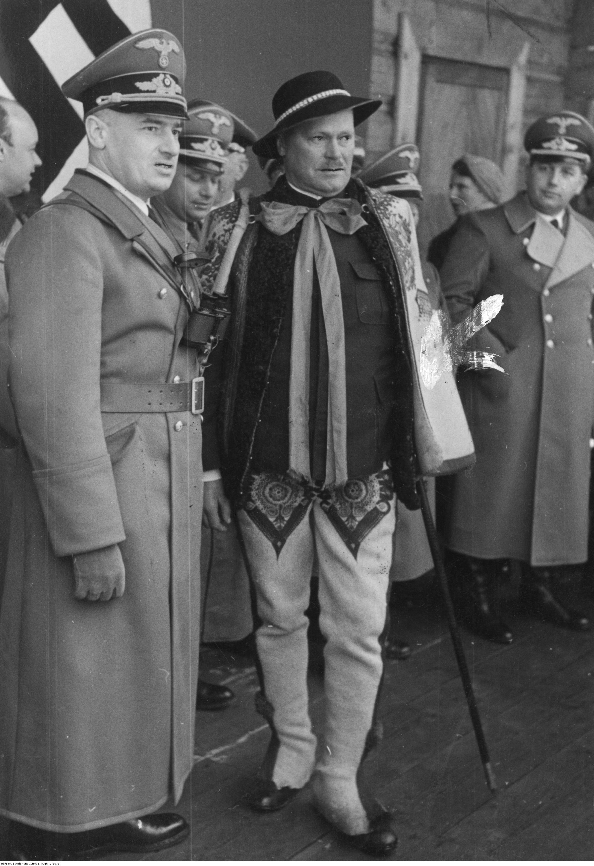 Gubernator Hans Frank (po lewej) podczas rozmowy z Wacławem Krzeptowskim (w stroju ludowym). W głębi: Josef Friedrich Buhler (pierwszy z prawej) i Max du Prel (na drugim planie pierwszy z lewej).